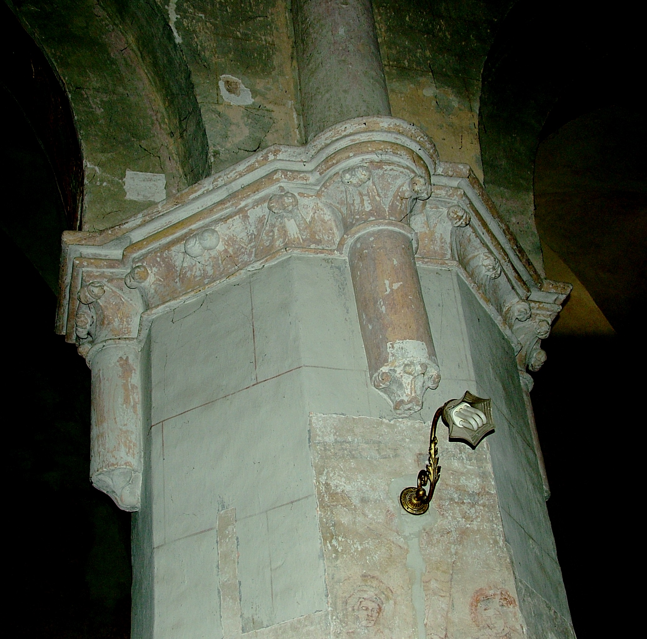 Türjei templom építészet- és freskórészletei (Zala megye)